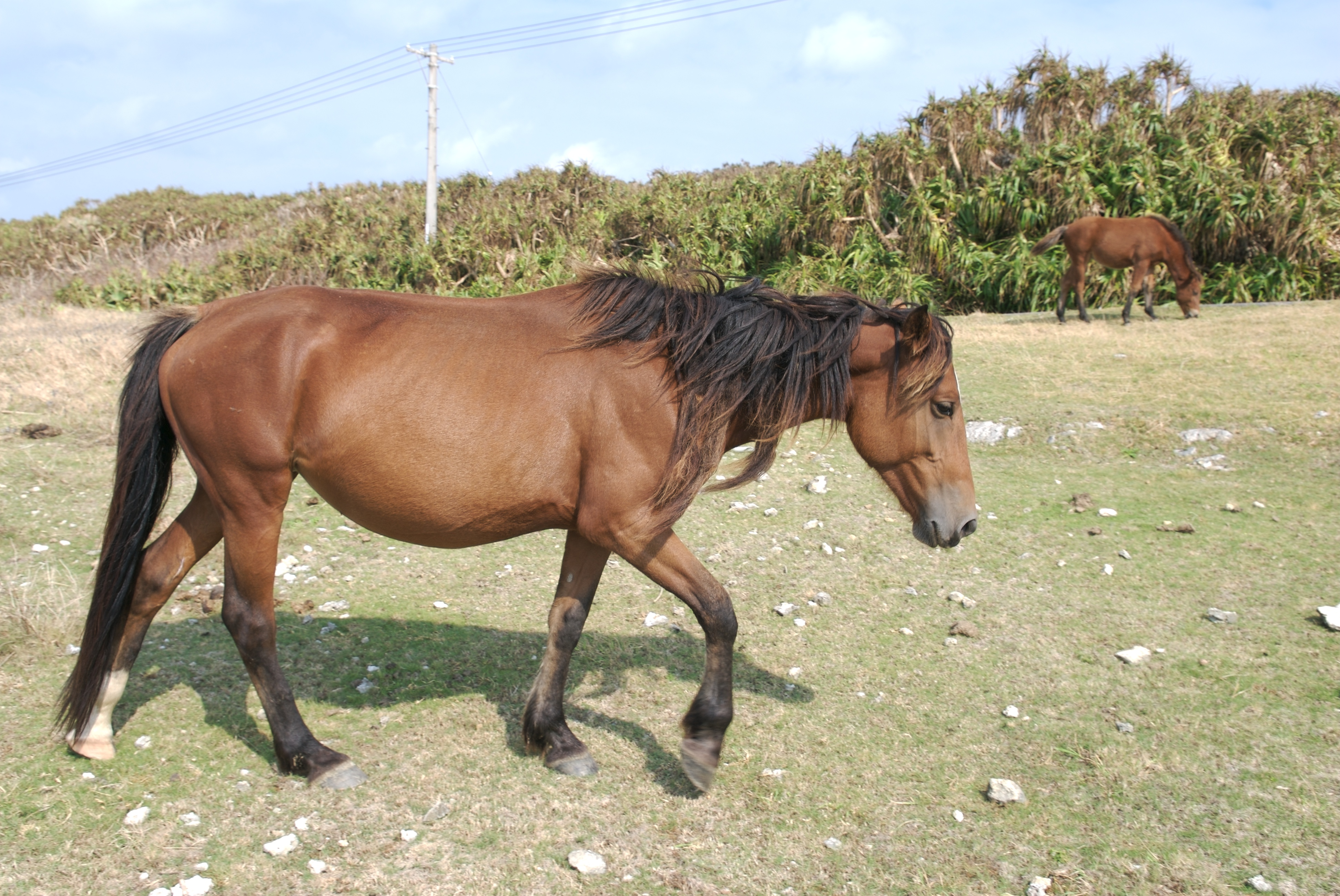 @Yonaguni Island